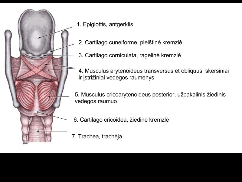 Gerklos ir svarbiausi raumenys